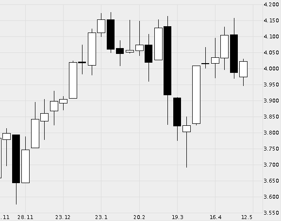 Candlechart vom aktuellen DAX!